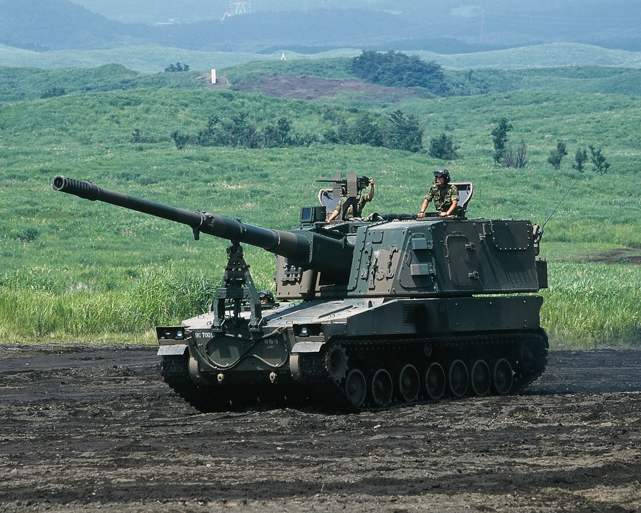 略称：15HSP 愛称：ロングノーズ [乗員]4人 [全備重量]40.0t [全長]11.3m [全幅]3.2m [全高]4.3m（積載状態） [旋回性能]超信地 [速度]49.6km/h [エンジン] 空冷4サイクル直列6気筒 ディーゼル機関 600ps [武装] 155mmりゅう弾砲 12.7mm重機関銃 [開発]防衛庁技術研究本部 [製作] ・砲塔：日本製鋼所 ・車体：三菱重工業 師団特科連隊などに配備され、近接戦闘部隊を支援する。11年度から調達を開始。